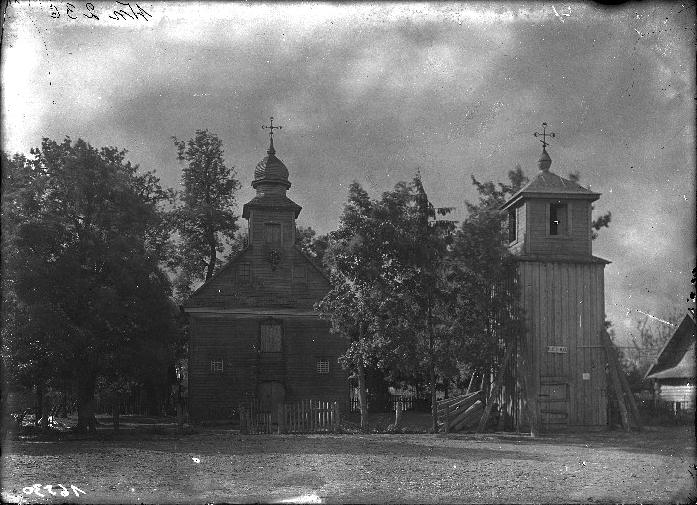 Беларуская (тарашкевіца): Ёды (Jody). Царква